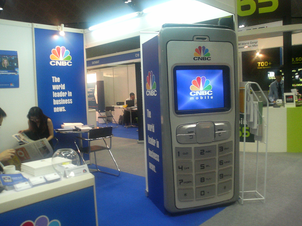 3GSM Asia: CNBC3GSM Asia: CNBC